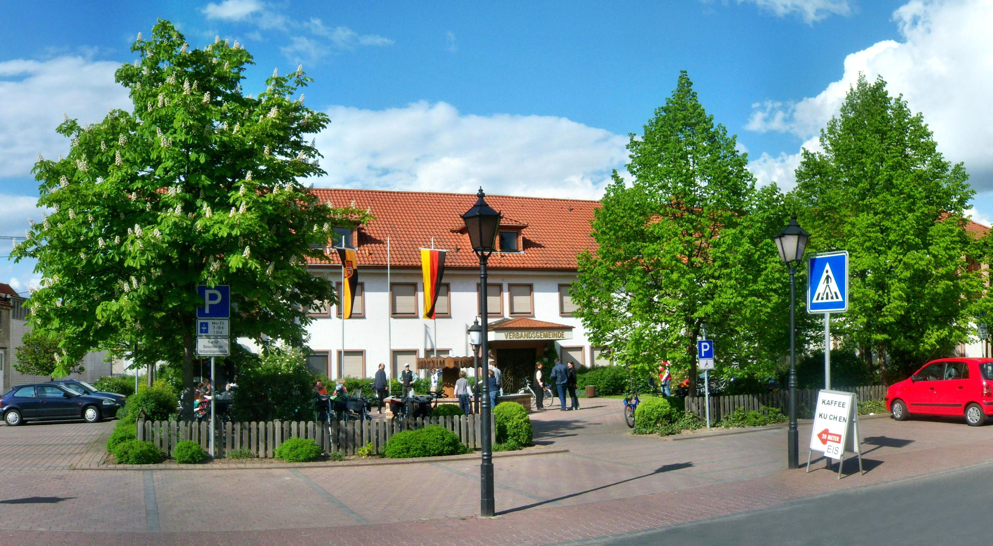 Der Verwaltungssitz der Verbandsgemeinde Eich in Rheinhessen, Deutschland